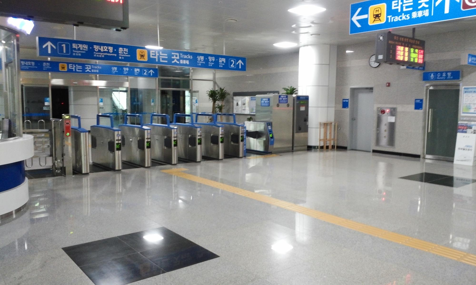 별내역 개찰구